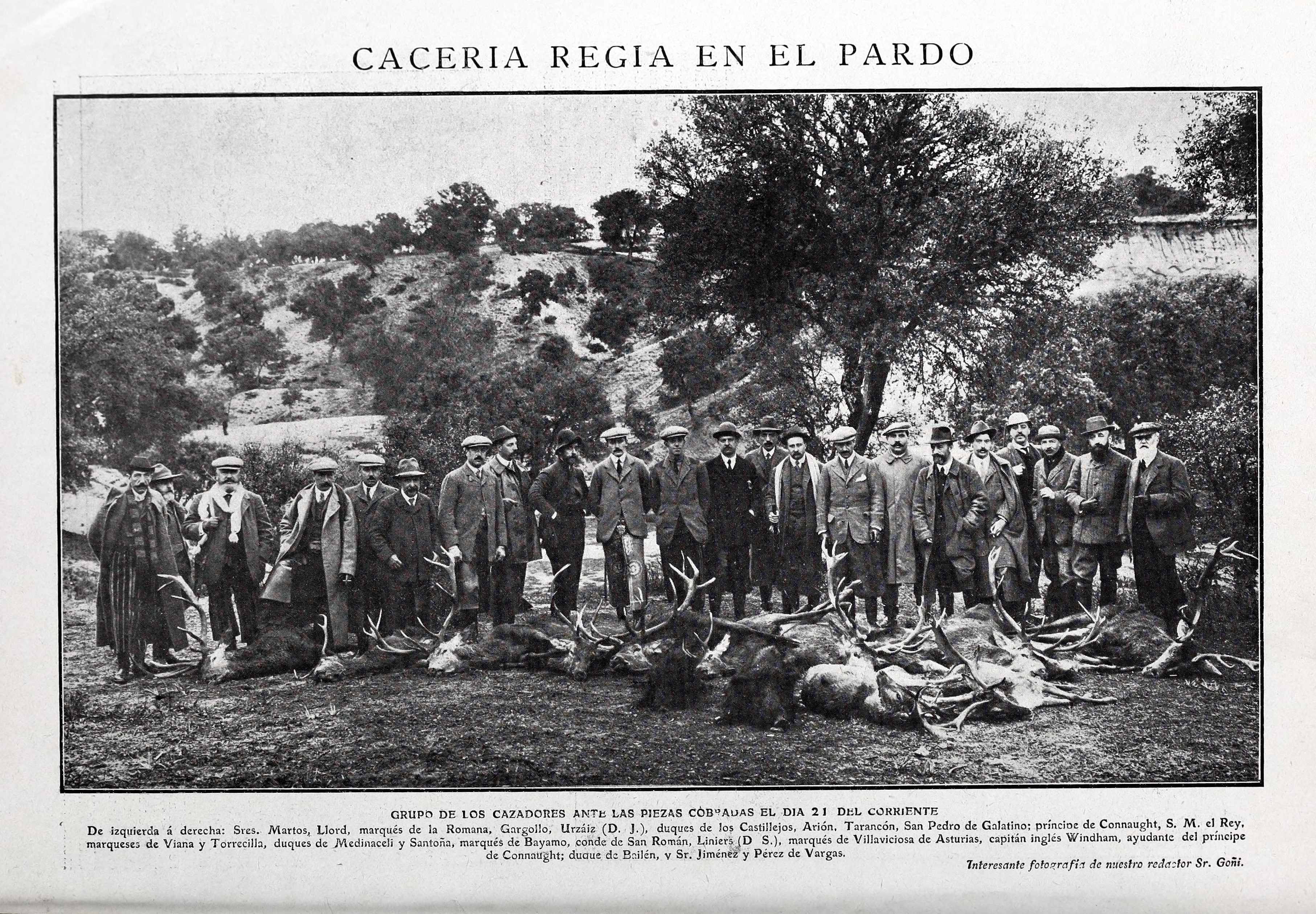 GRUPO DE LOS CAZADORES ANTE LAS PIEZAS COBRADAS EL DÍA 21 DEL CORRIENTE De izquierda á derecha: Sres. Martos, Llord, marqués de la Romana, Gargollo, Urzáiz (D. J.), duques de los Castillejos, Arión, Tarancón, San Pedro de Galatino, príncipe de Connaught, S. M. el Rey, marqueses de Viana y Torrecilla, duques de Medinaceli y Santoña, marqués de Bayamo, conde de San Román, Liniers (D. S.), marqués de Villaviciosa de Asturias, capitán inglés Windham, ayudante del príncipe de Connaught, duque de Bailén y Sr. Jiménez y Pérez de Vargas.Interesante fotografía de nuestro redactor Sr. Goñi